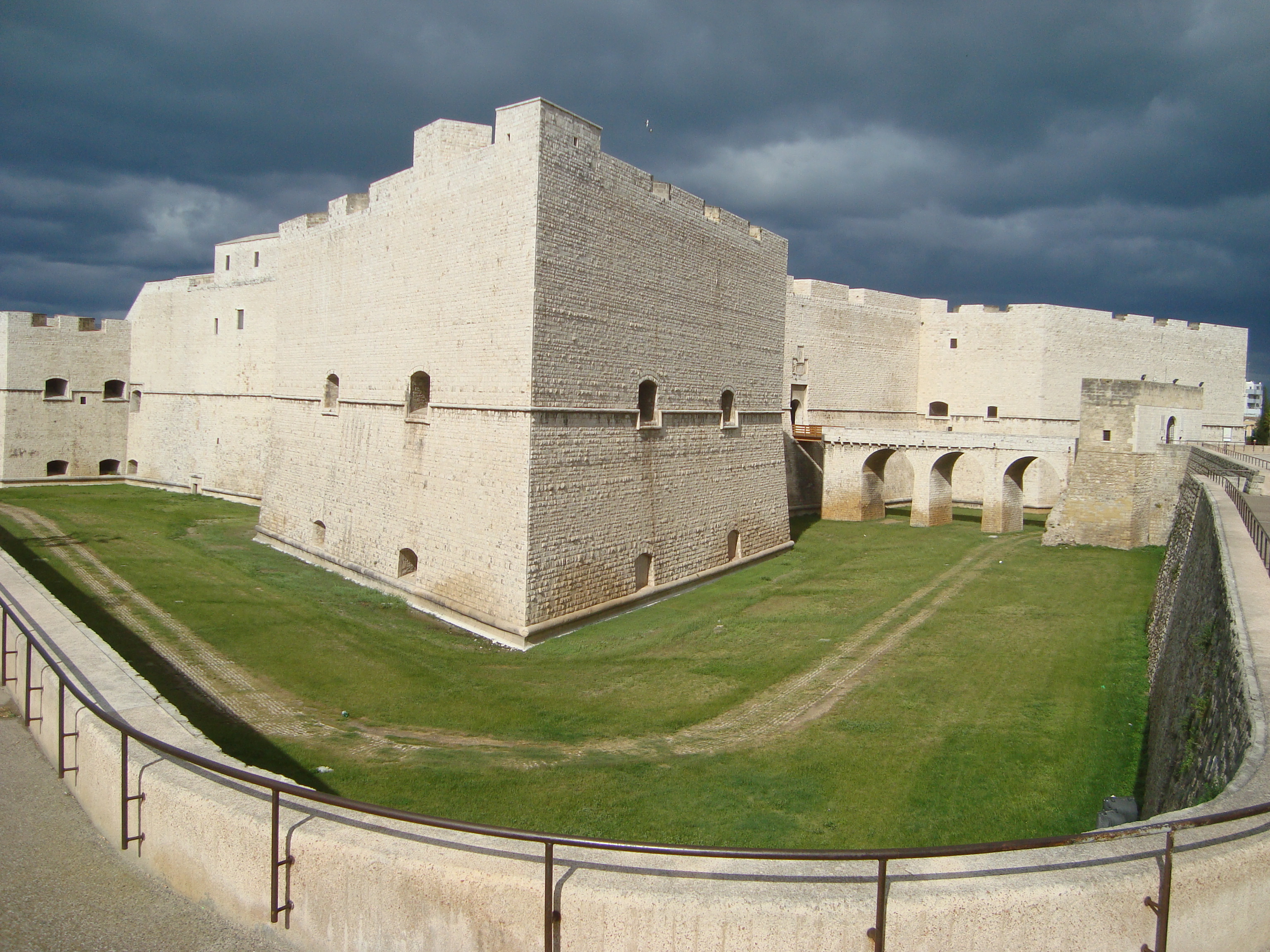 Barletta